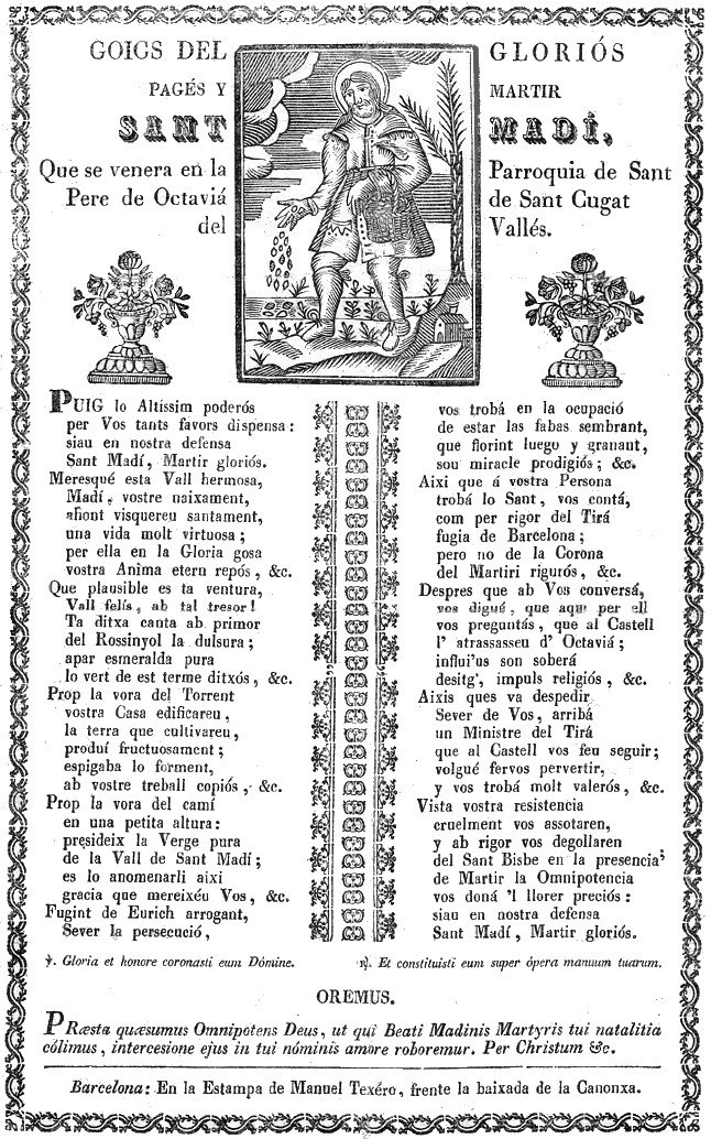 "Goigs" de Sant Medir, començament del s. XIX?